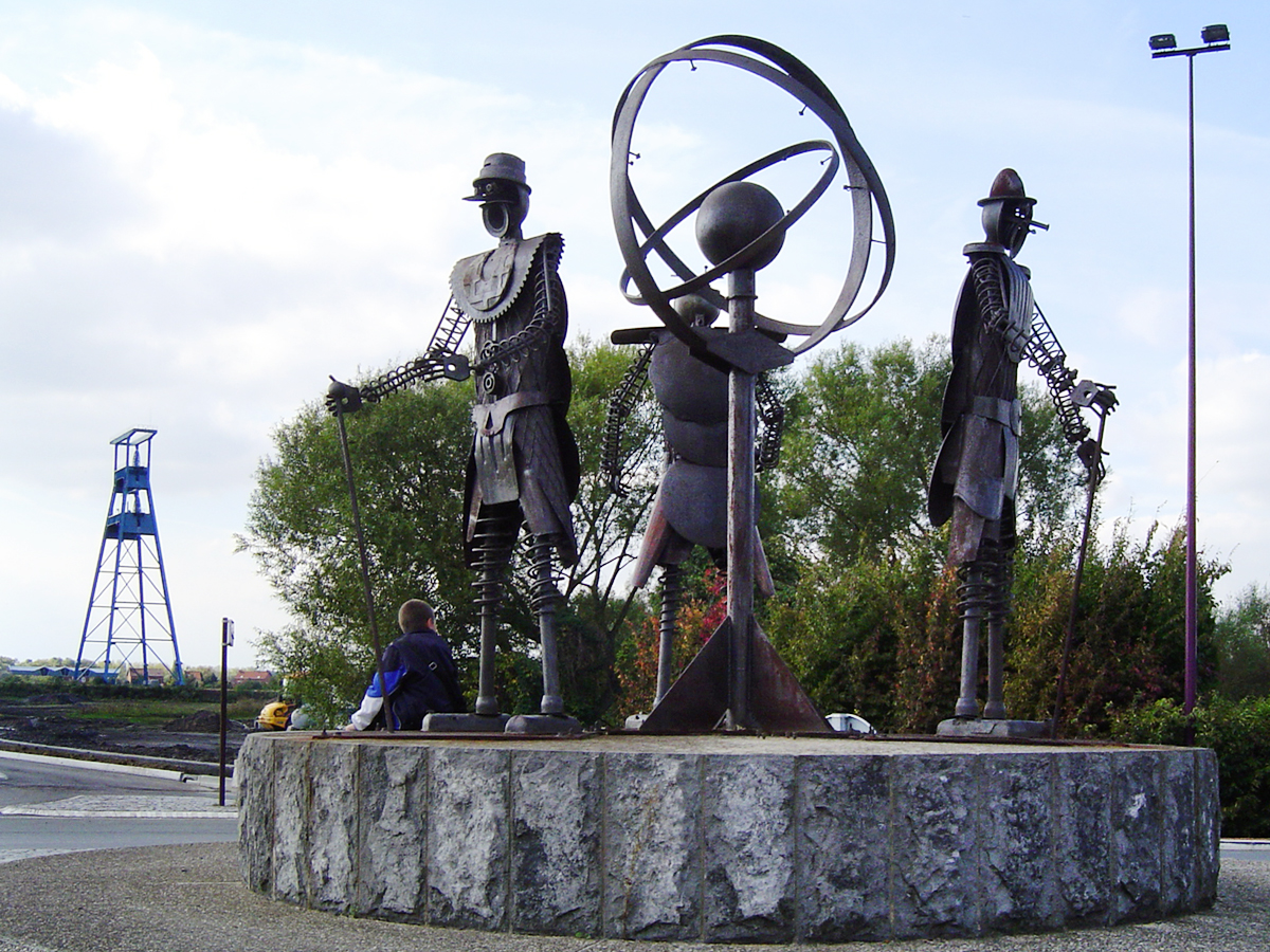 La Java des Gaspards, sculpture de Philippe Depienne, Roost-Warendin (Nord, France)